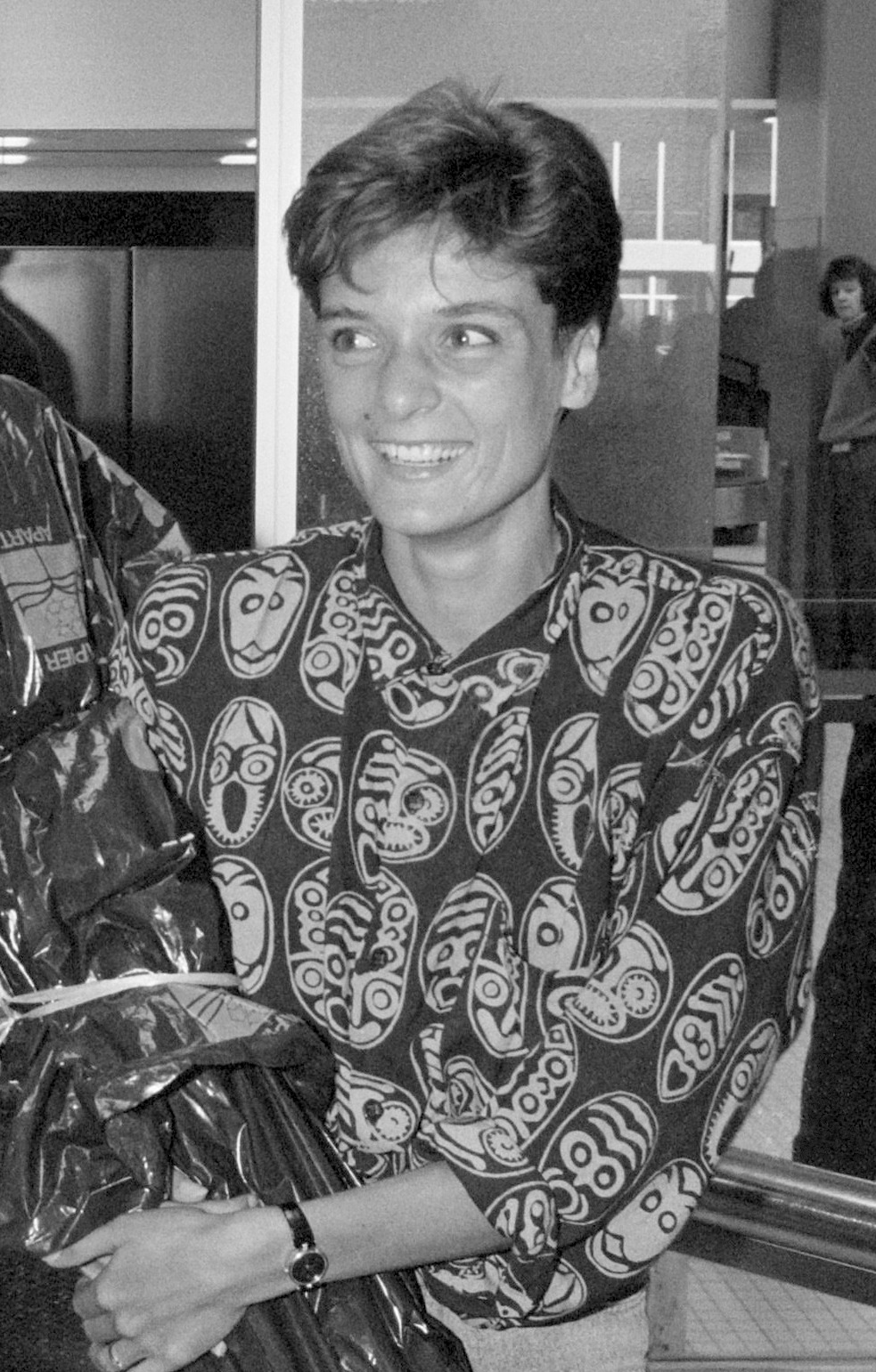 Opdracht GPD: atlete Marjan Olyslager met echtgenoot op Schiphol